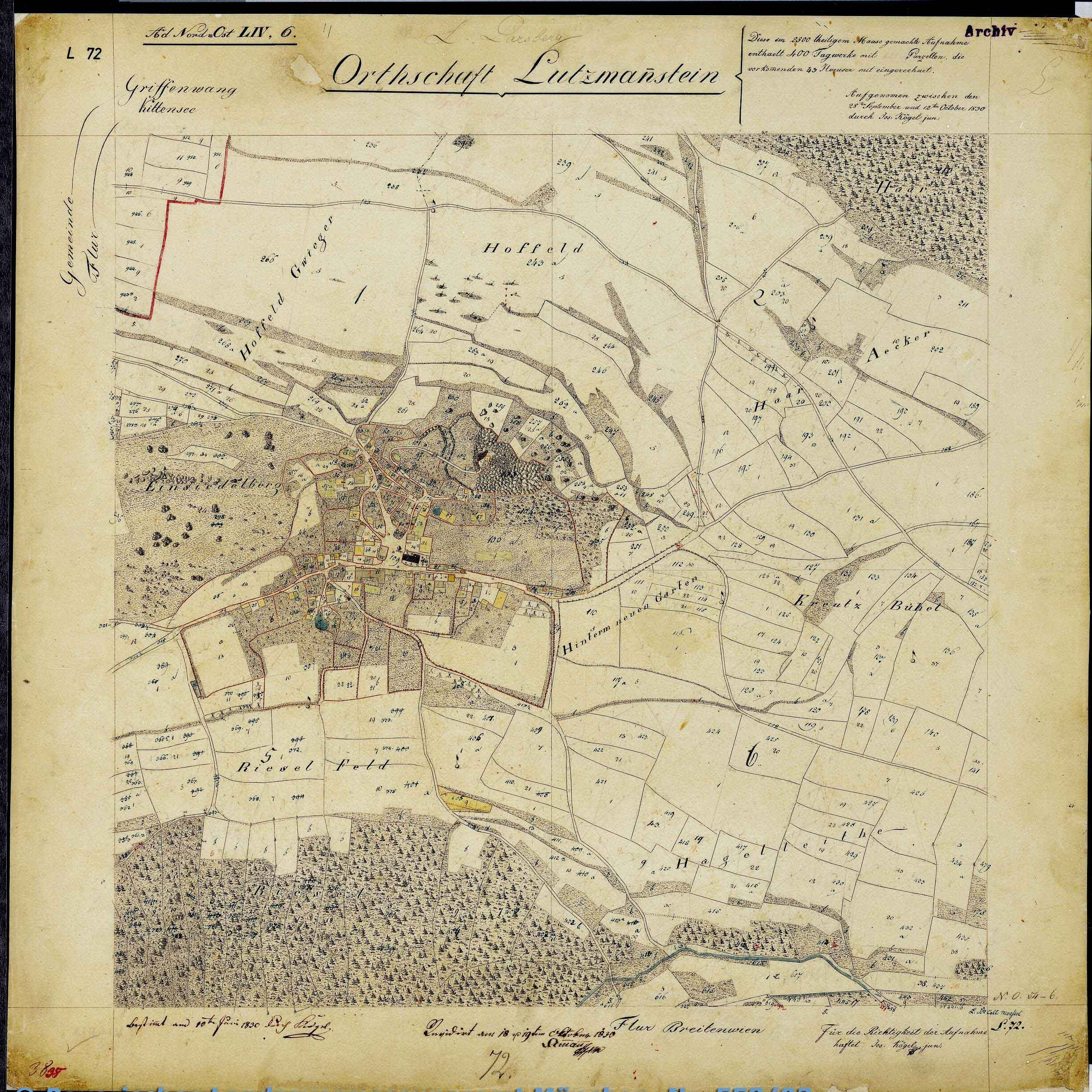 Ortsblatt des Königreichs Bayern: Lutzmannstein Kreis Neumarkt Oberpfalz 1830